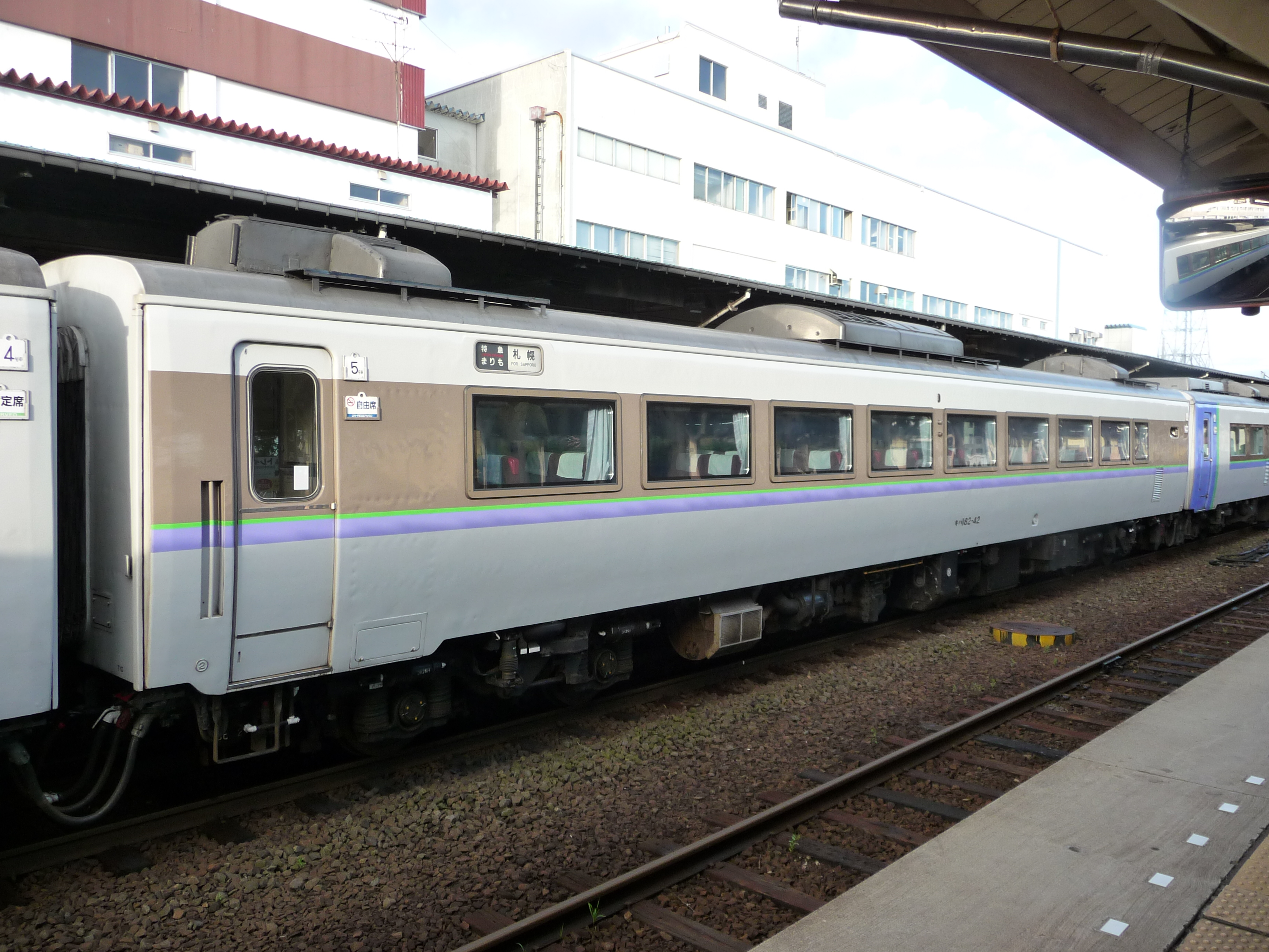 JR北海道のキハ183系気動車（キハ182-42） 側面窓外面にポリカーボネート板追設済